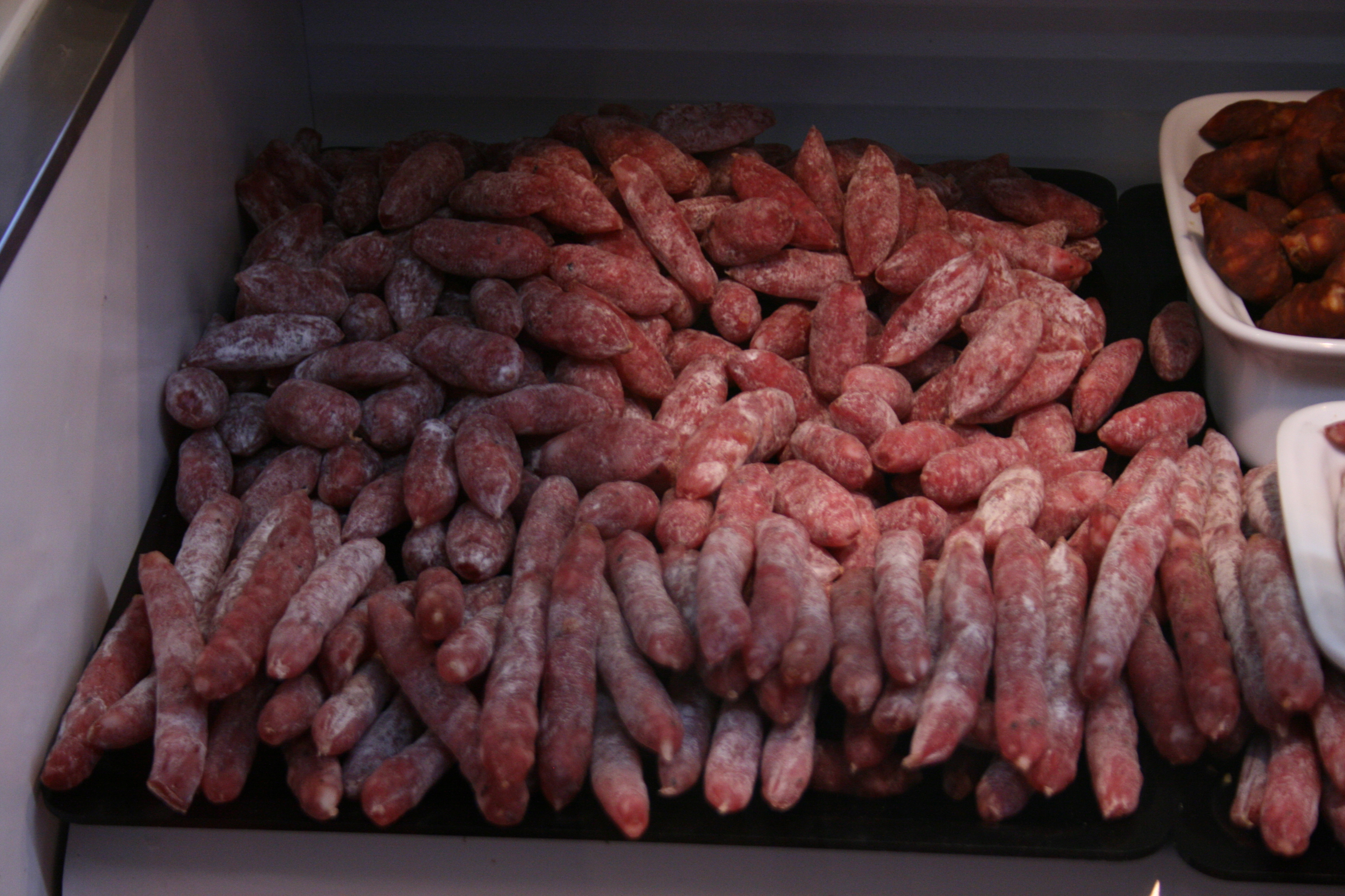 Fuet - Mercado de San Miguel